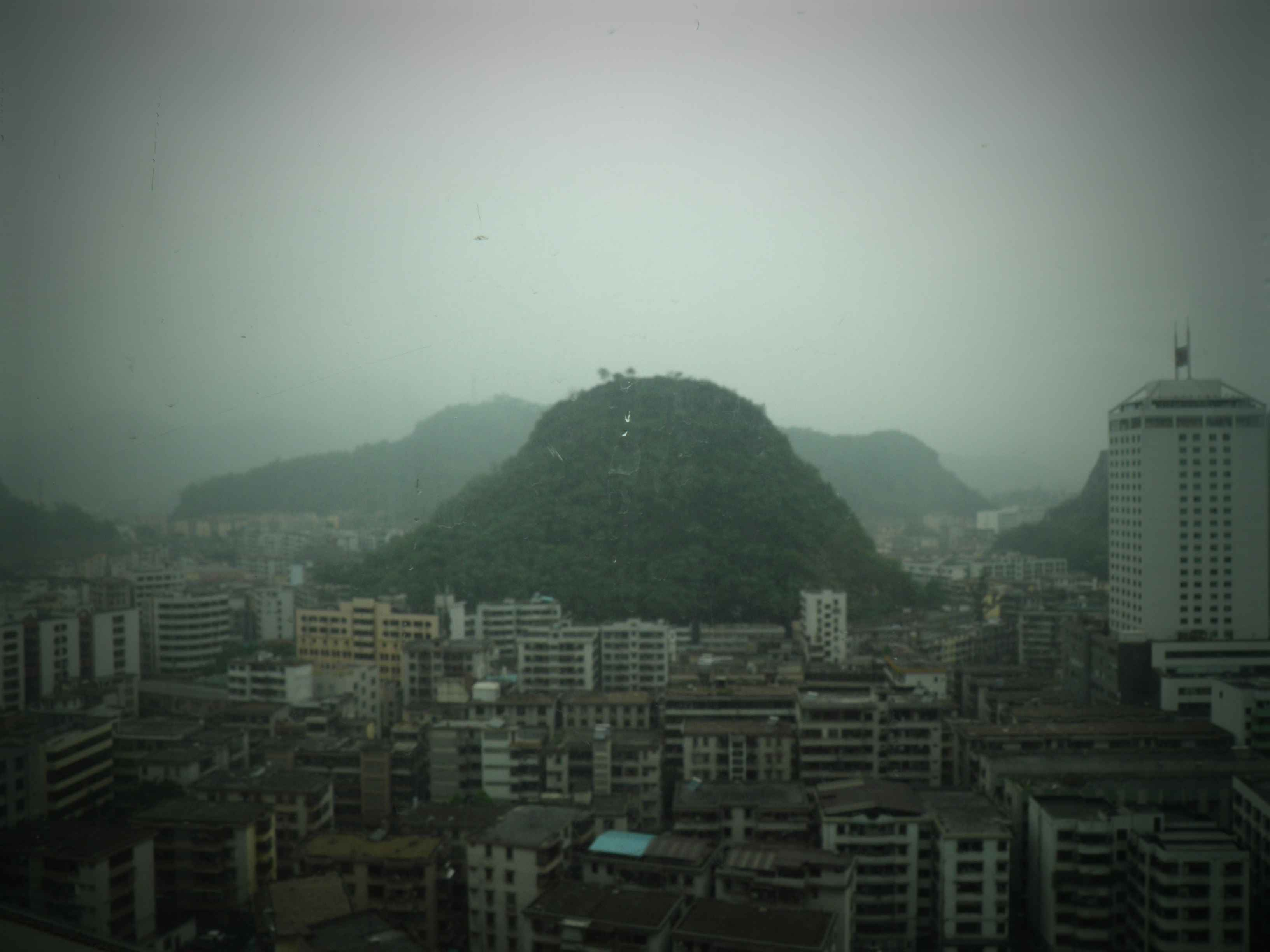 yunfu